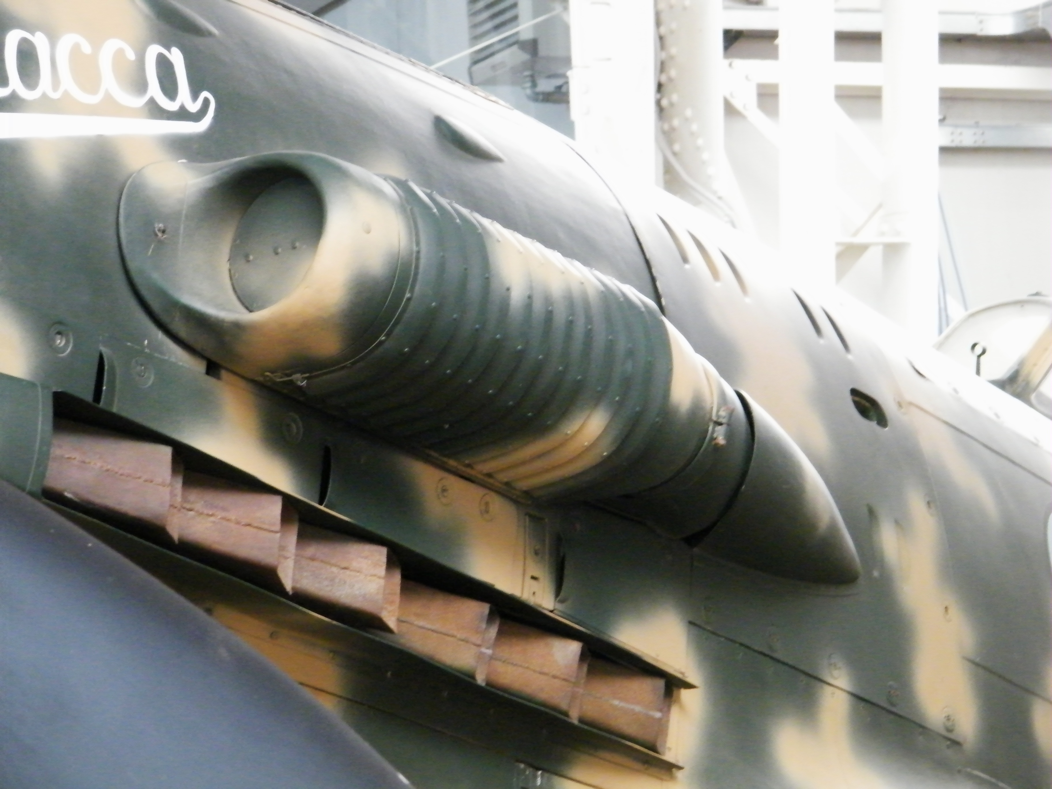 Condotto d'aspirazione con il filtro dell'aria di un Macchi M.C.202 presso il Museo storico dell'Aeronautica Militare di Vigna di Valle